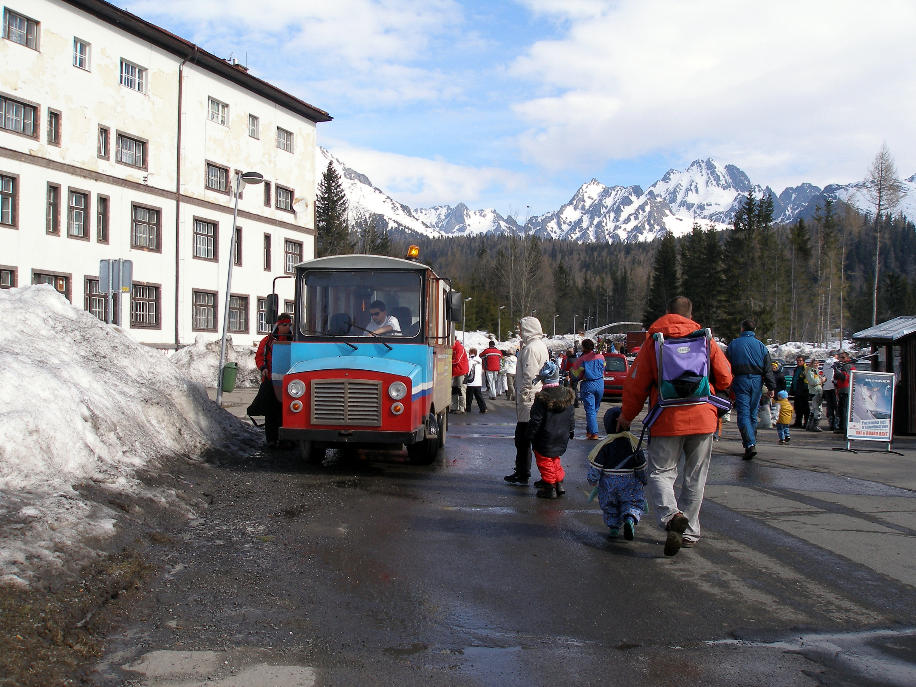 Štrbské Pleso 9.4.2007